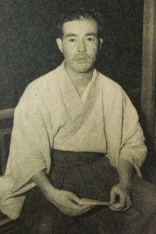 松田茂行